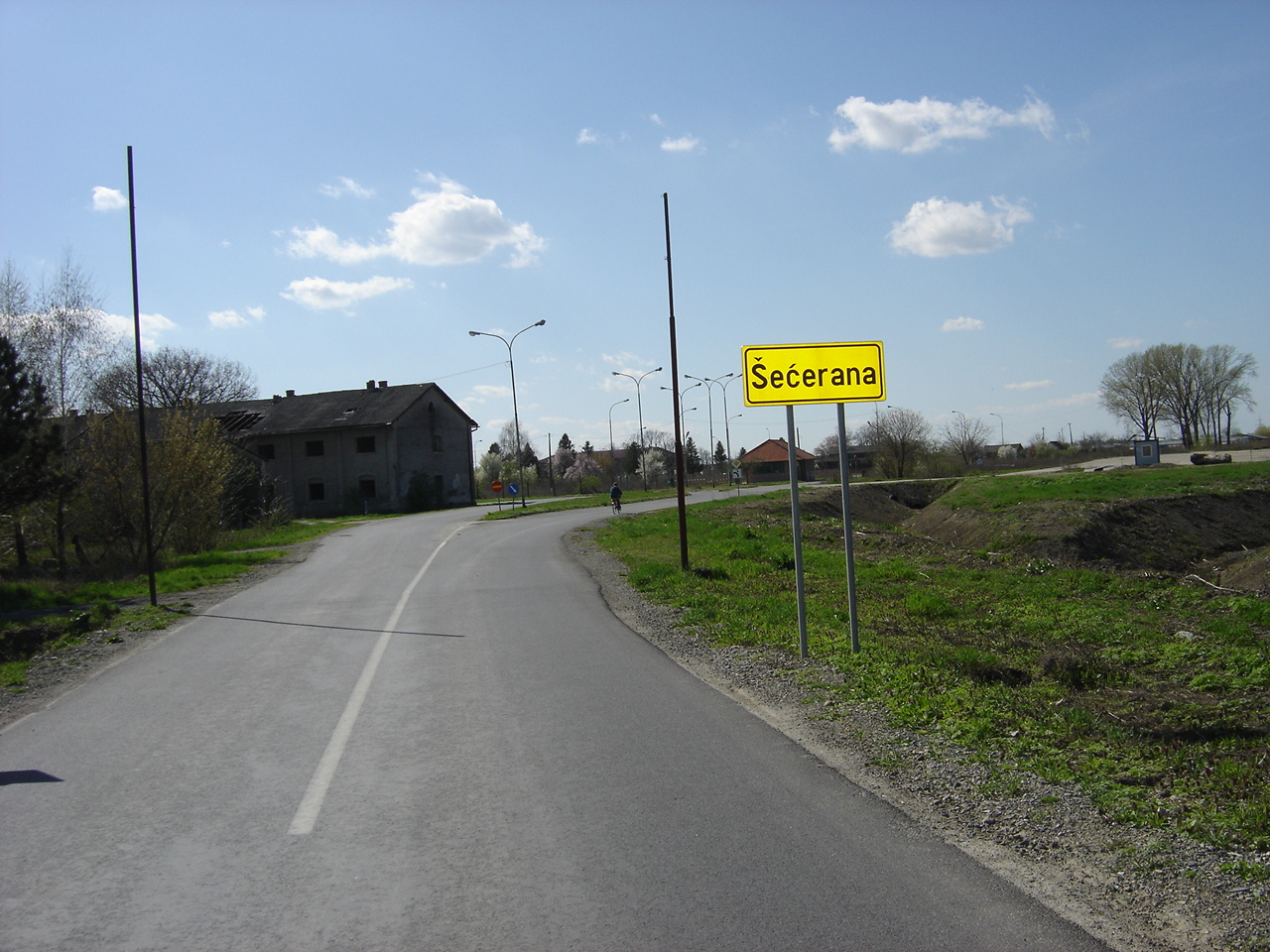 Županijska cesta Ž4036 u Baranji, ulazak u Šećeranu